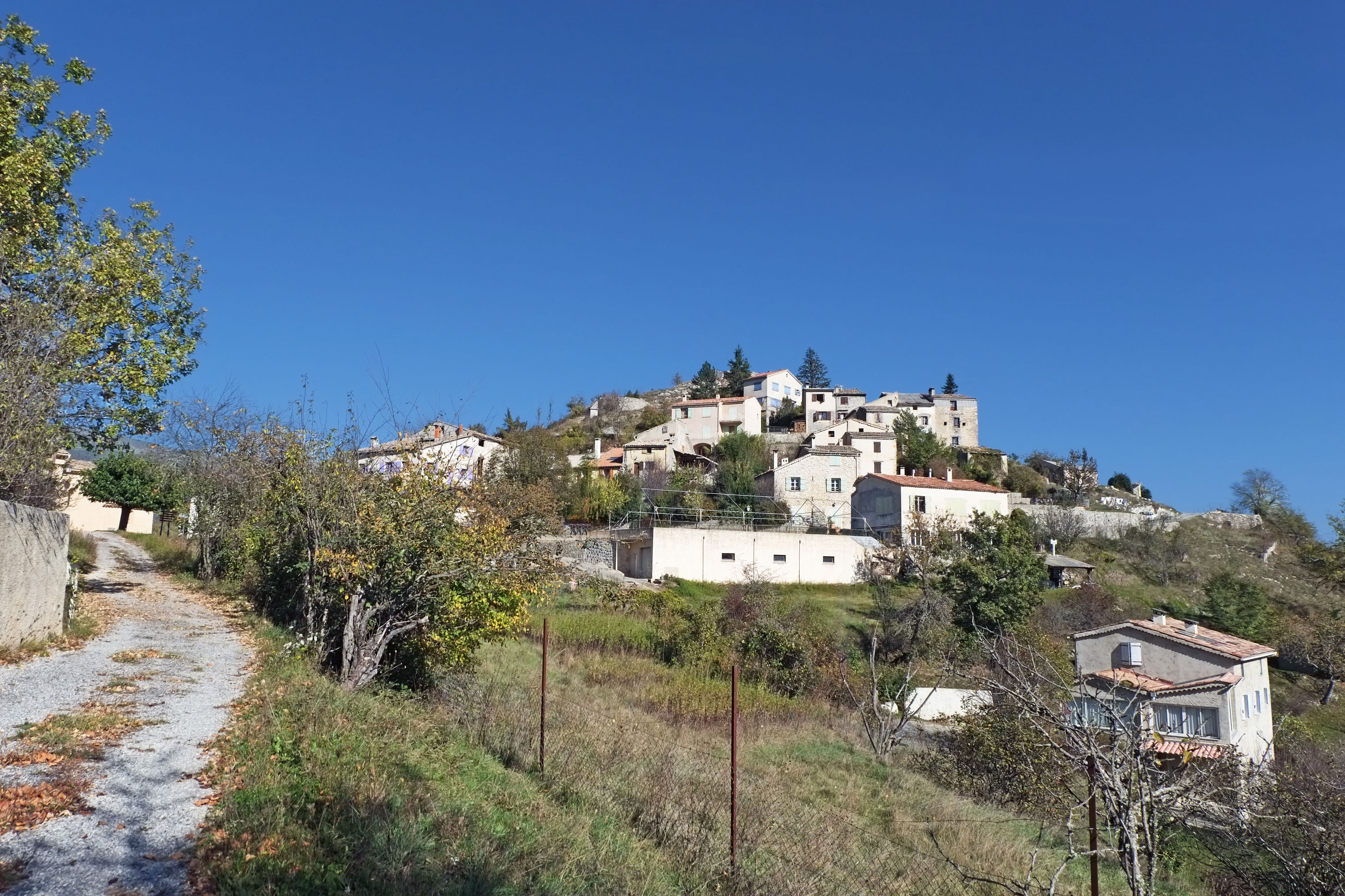 Vue du village des Mujouls depuis la rue des Pommiers.